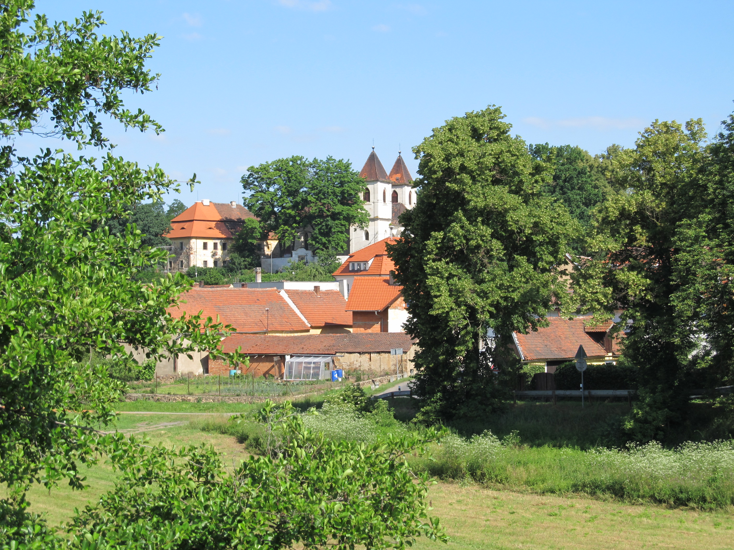 Hradec